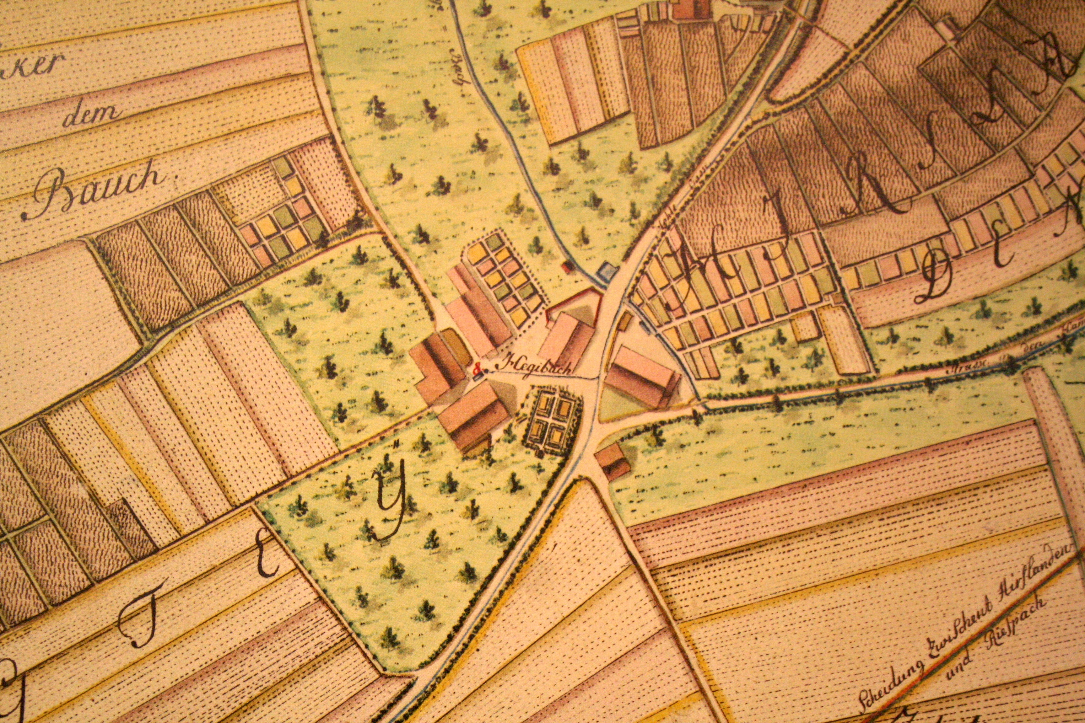 Der Hegibachplatz auf dem Müllerplan von 1793